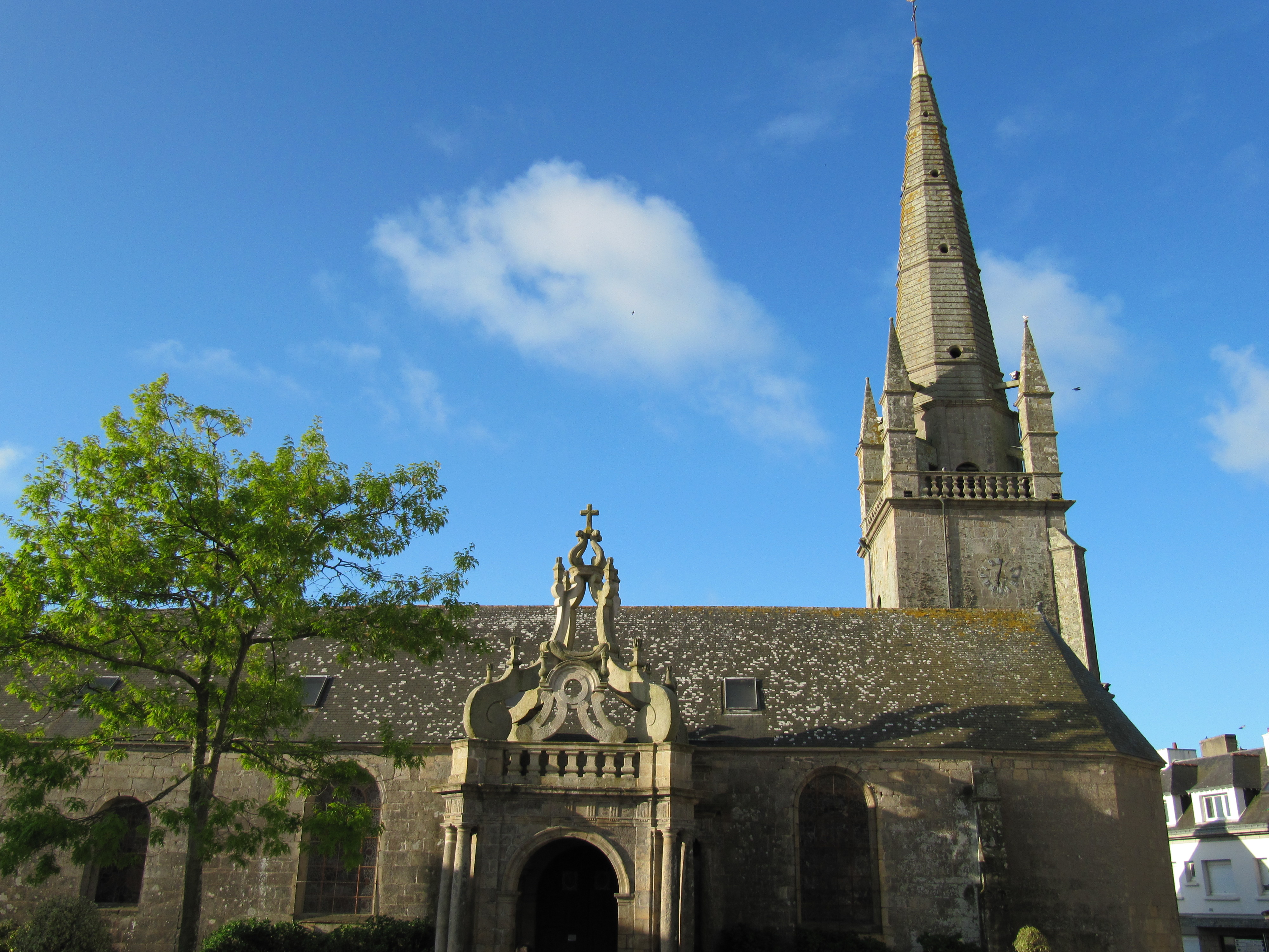 vue de côté sur l'église au centre de Carnac .